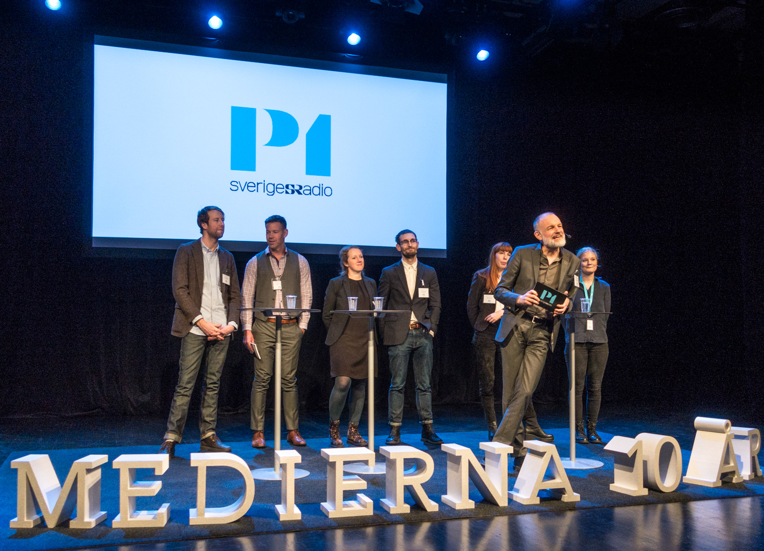 Redaktionen på Medierna i P1 på Kulturhuset Stadsteatern (Forum/Debatt) i Stockholm den 24 januari 2017 i samband med att Medierna fyller 10 år.